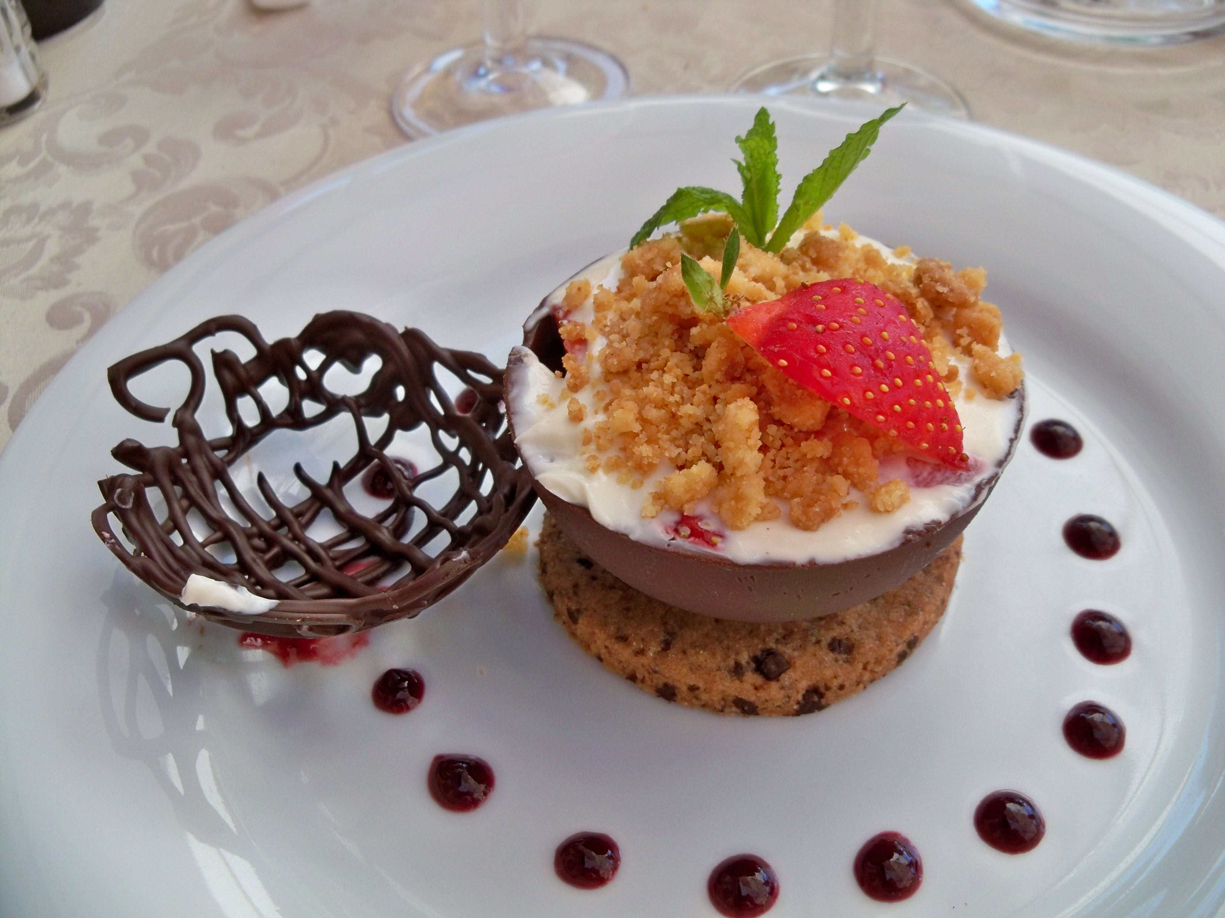 Boule chocolat au crumble de fraises